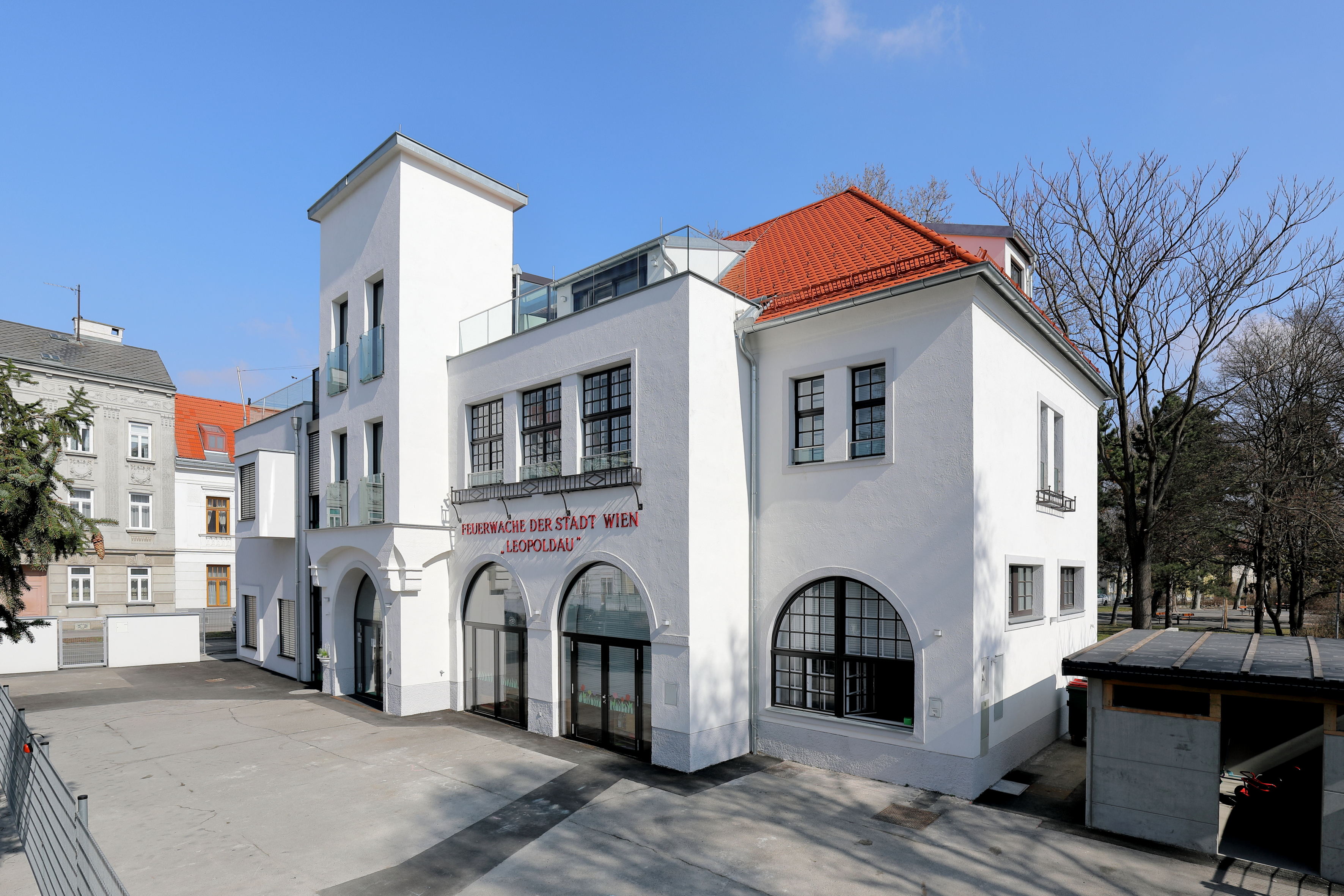 Die ehemalige Feuerwache in der Leopoldau, ein Bezirksteil des 21. Wiener Bezirkes Floridsdorf.Das denkmalgeschützte Gebäude wurde 1927 errichtet und 1996 durch die neue Hauptfeuerwache Floridsdorf in der Josef-Brazdovics-Straße ersetzt. 2016 wurde das Gebäude für einen Kindergarten adaptiert und nordseitig erweitert.